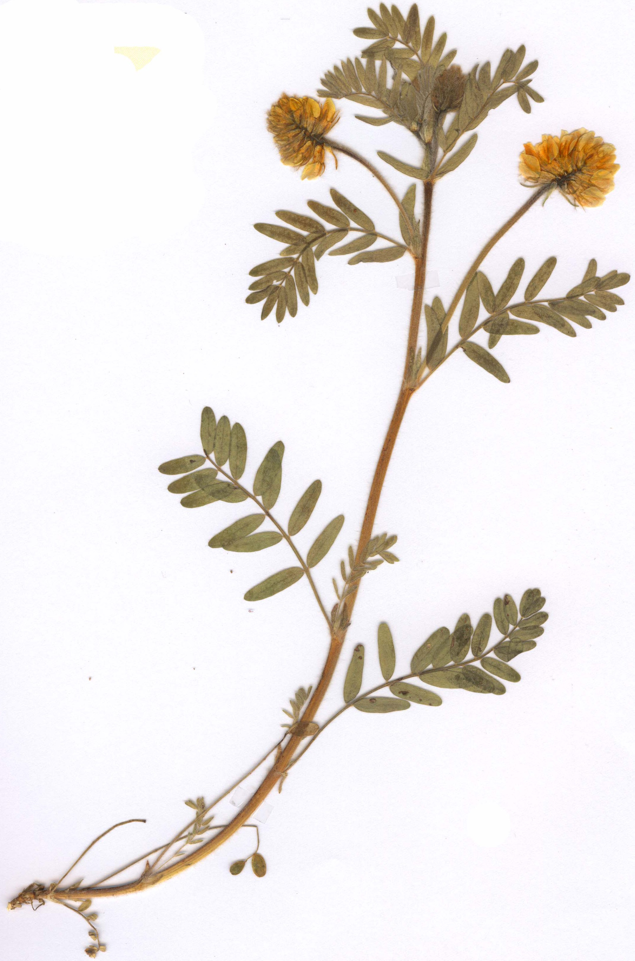 Oxytropis pilosa, eigener Herbarbeleg vom 9. Juni 1982, Fundort: Grabfeld, Nordbayern (exakter Fundort wurde retuschiert zum Schutz des Standorts)